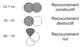 Illustrations des différents recouvrements entre orbitales atomiques